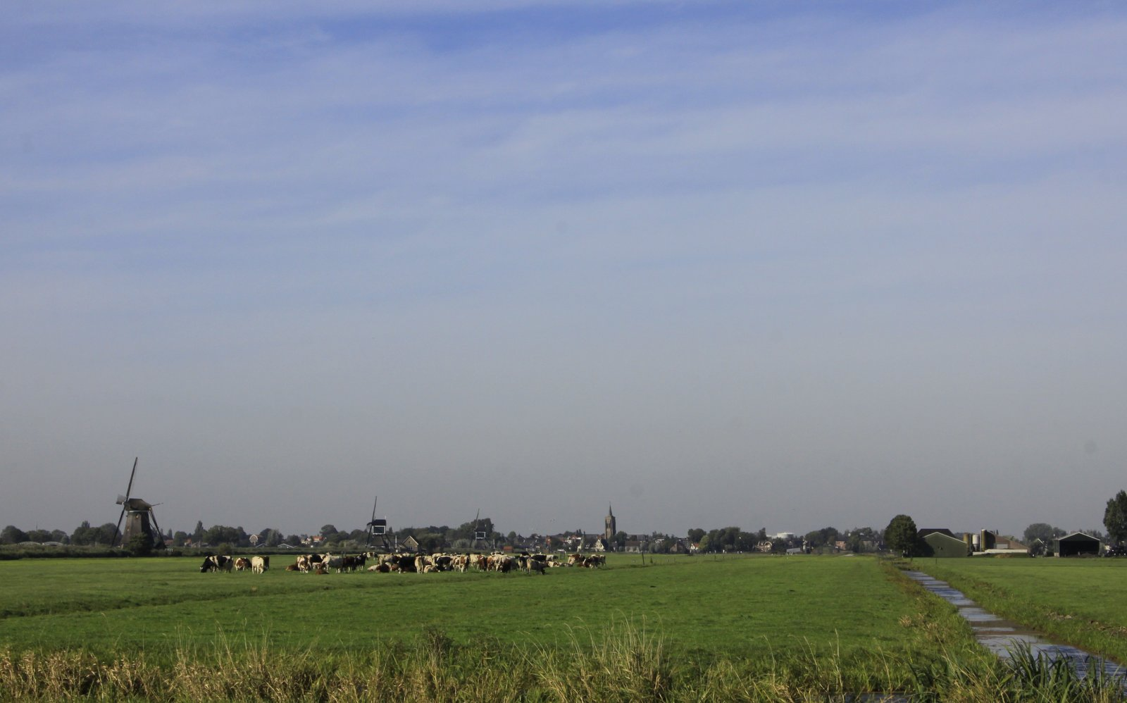 Vanaf het kleine buurtschap Achterland kijken we over de polder met meerdere molens naar Groot -Ammers.